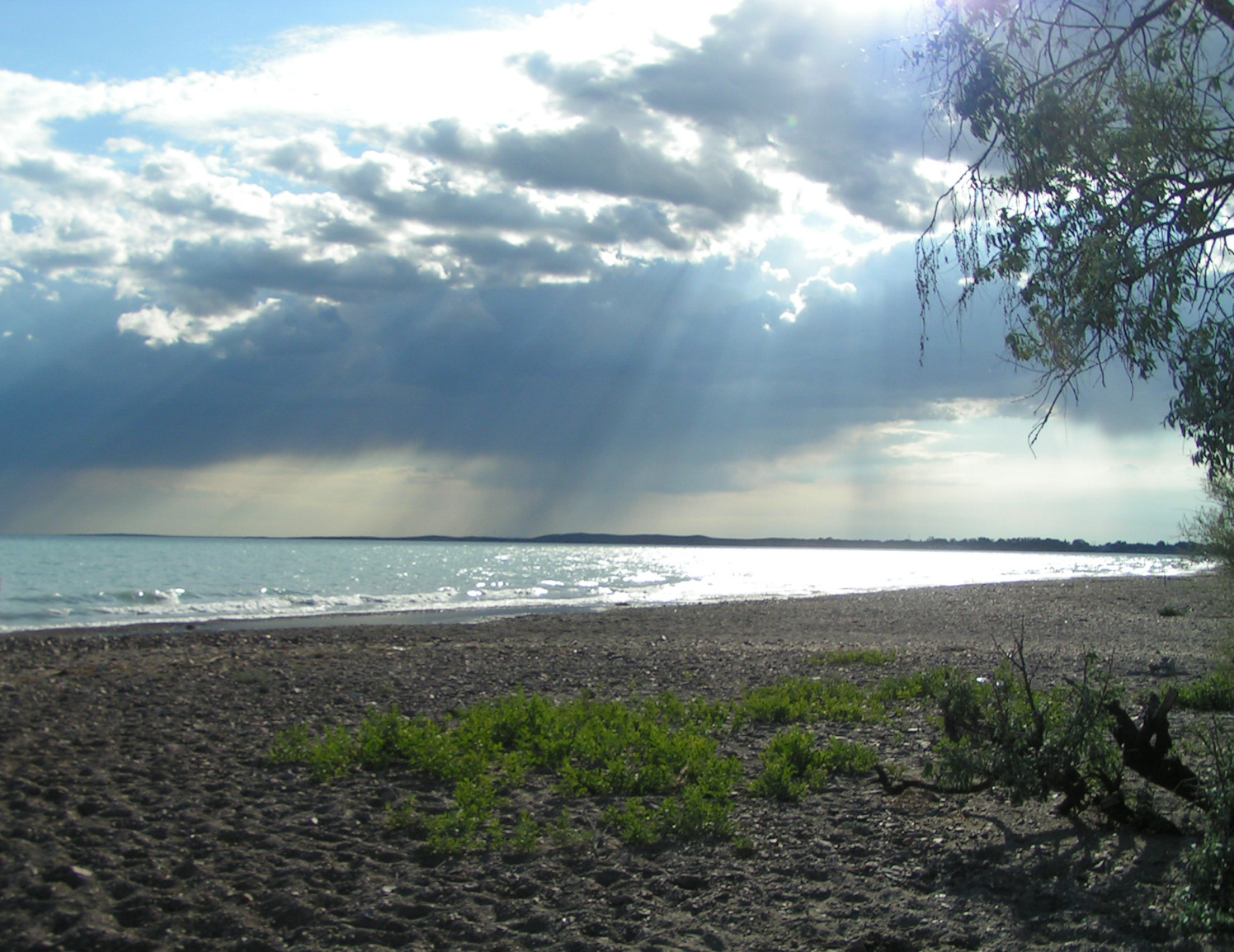 Lake Balkhash in Kazakhstan